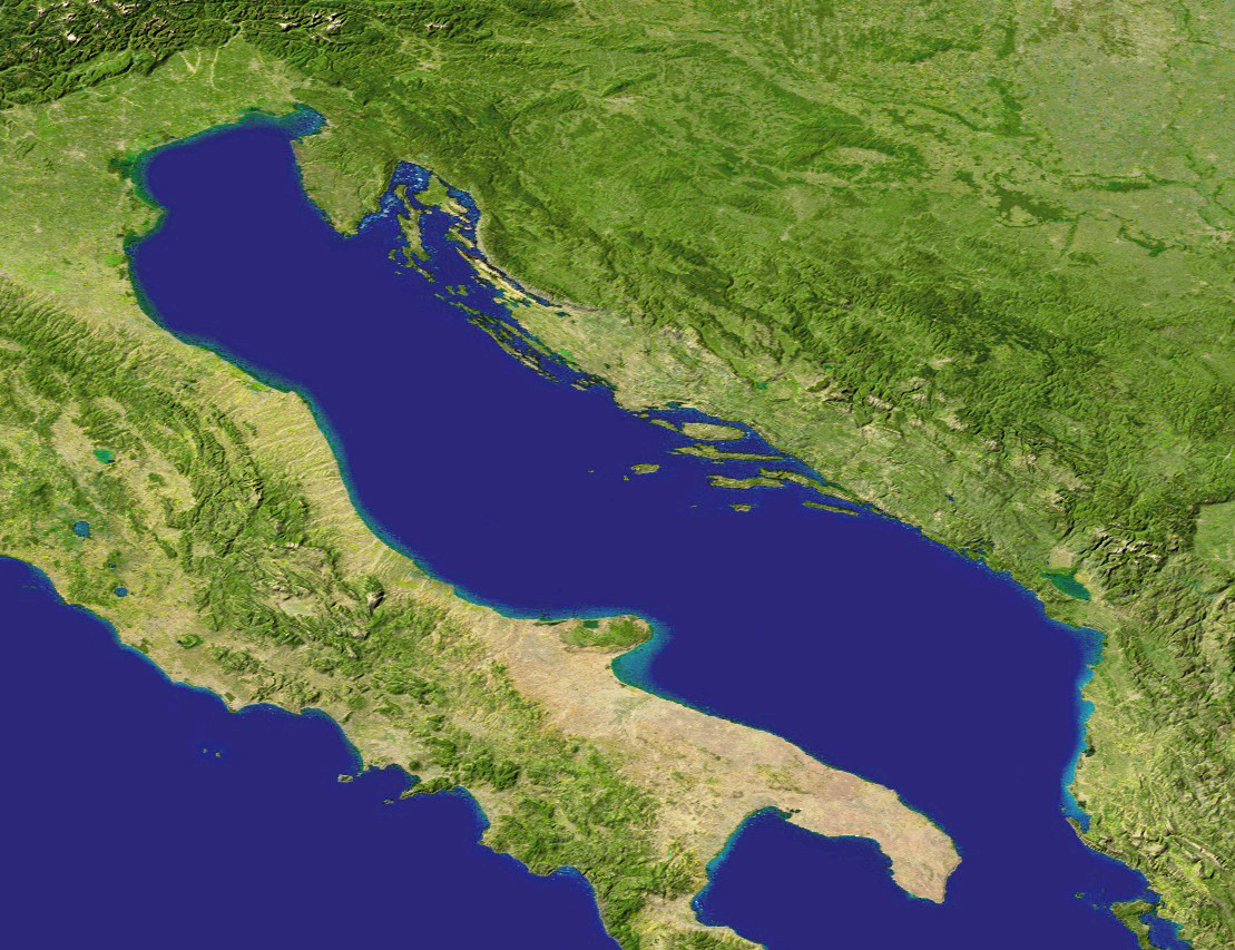 Ausschnitt aus Blue Marble-Karte der NASA, die Adria zeigend.